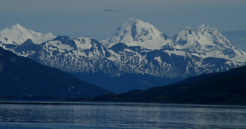 Montes Francés, Bove y Roncagli, Cordillera Darwin, Chile.